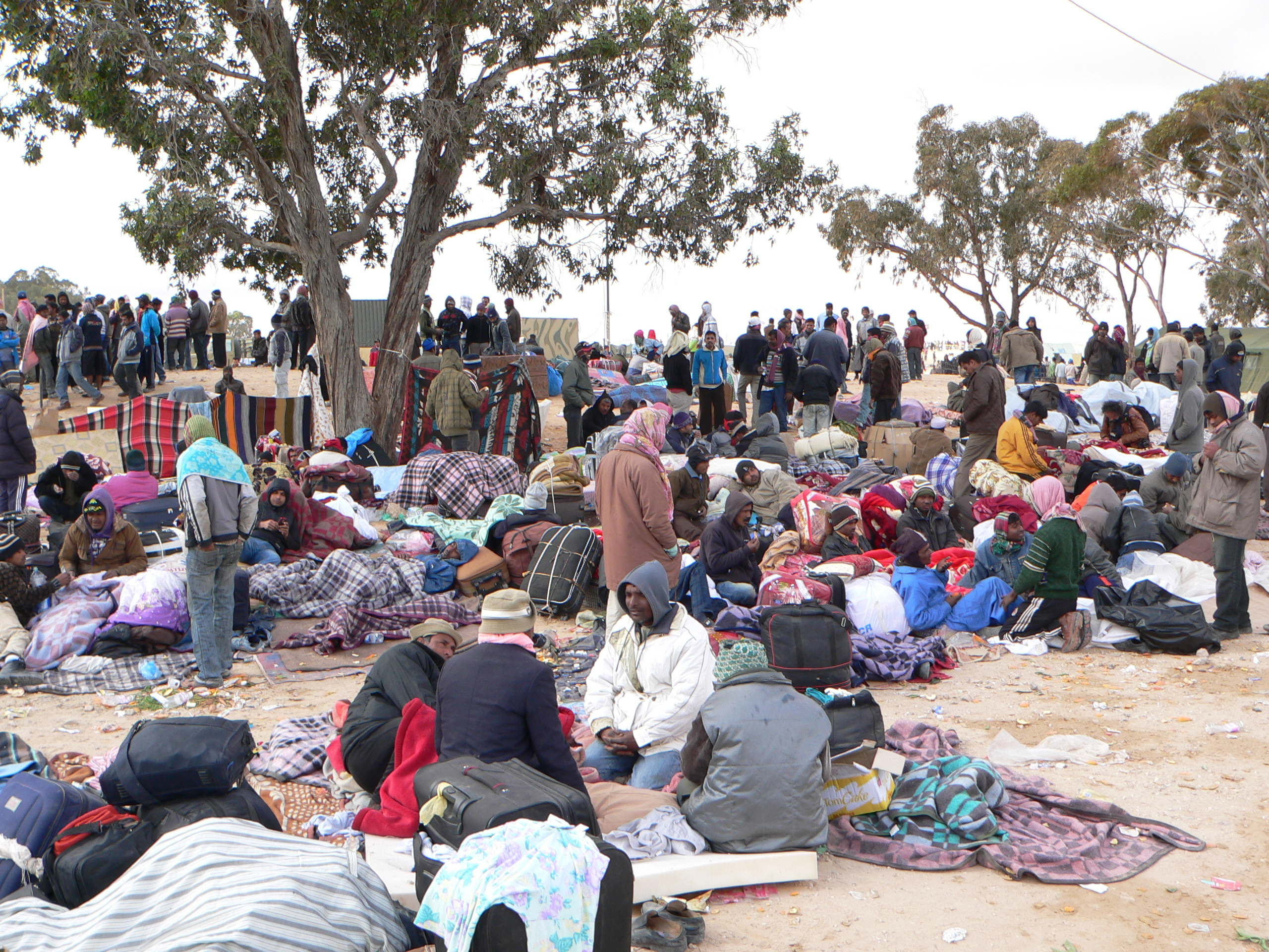 Réfugiés du Bangladesh au Camps de Choucha - Tunisie